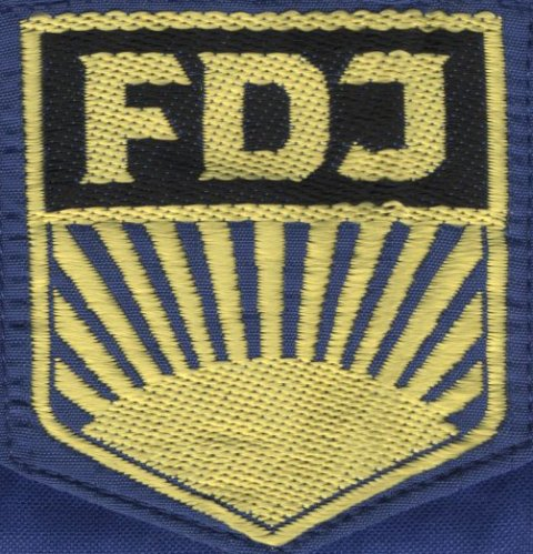 Embleme of the Freie Deutsche Jugend